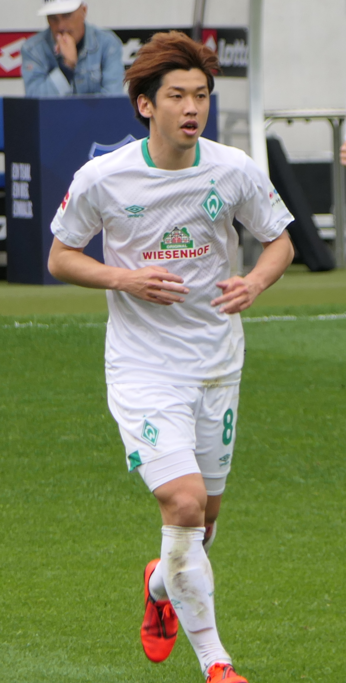 Der Fussballprofi Yūya Ōsako im Trikot vom SV Werder Bremen beim Auswärtsspiel gegen die TSG 1899 Hoffenheim am 11.05.2019.